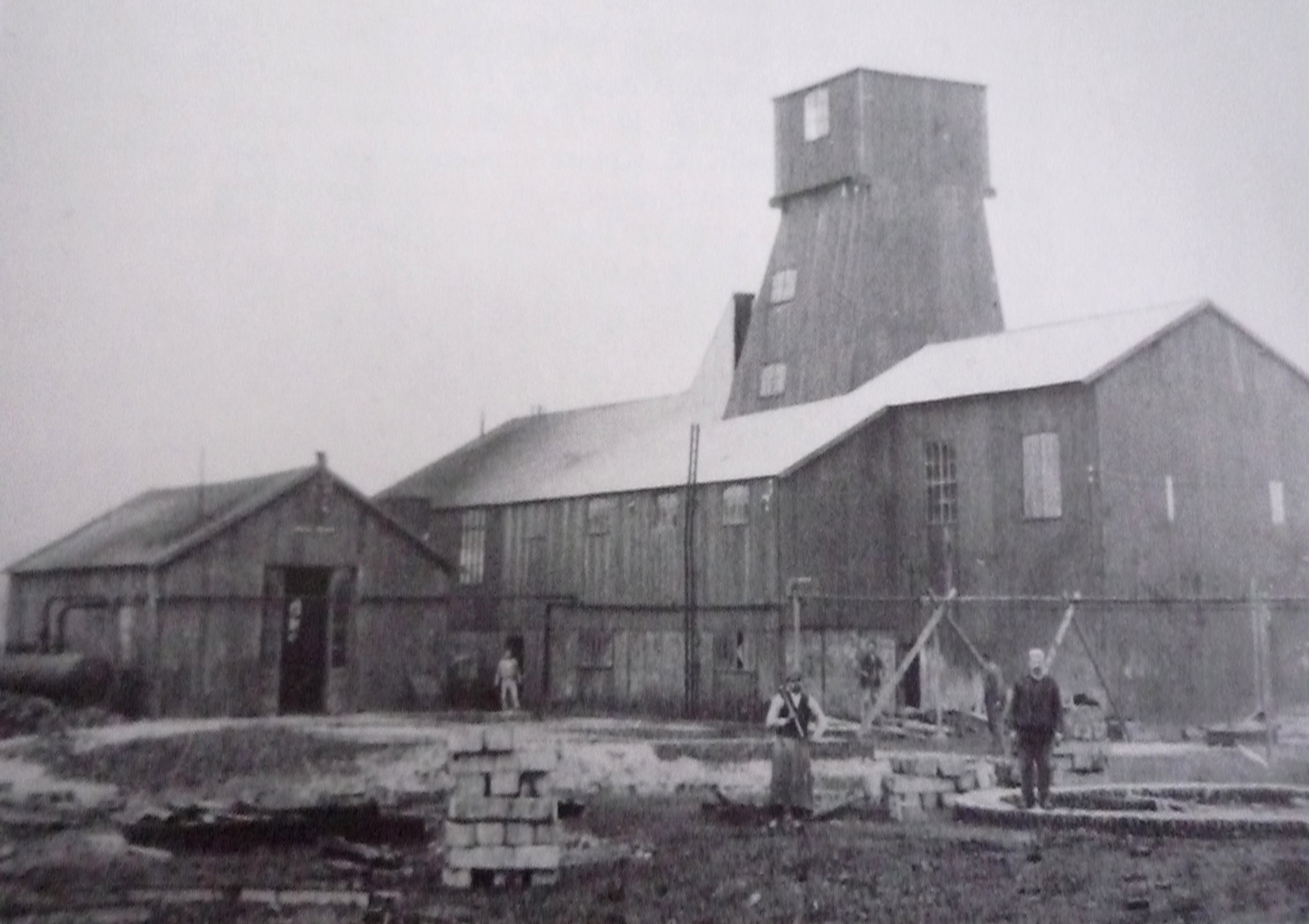 La Fosse n° 12 de la Compagnie des mines de Béthune était un charbonnage constitué d'un seul puits situé à Annequin, Pas-de-Calais, Nord-Pas-de-Calais, France.